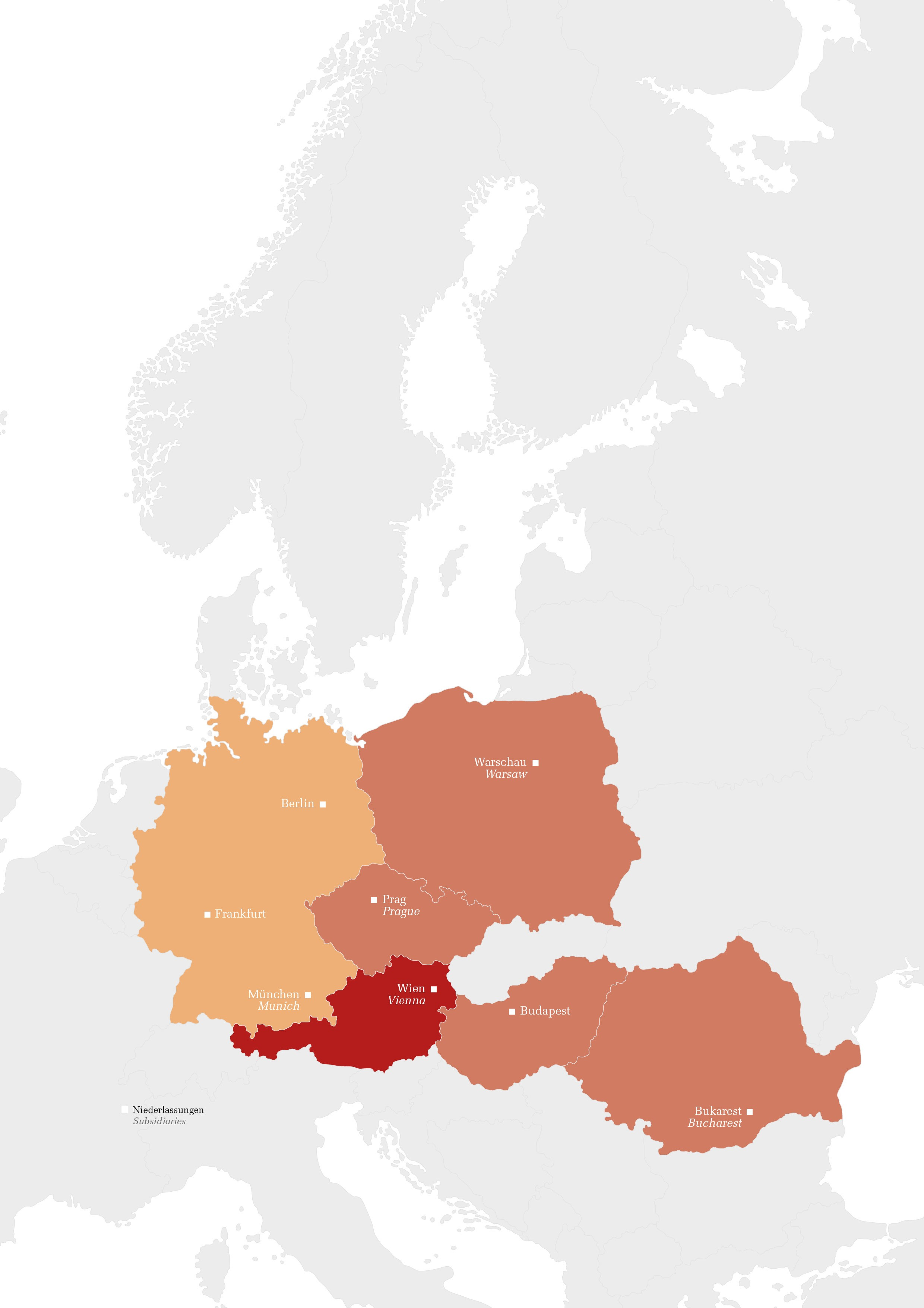 Niederlassungen der CA Immo Gruppe